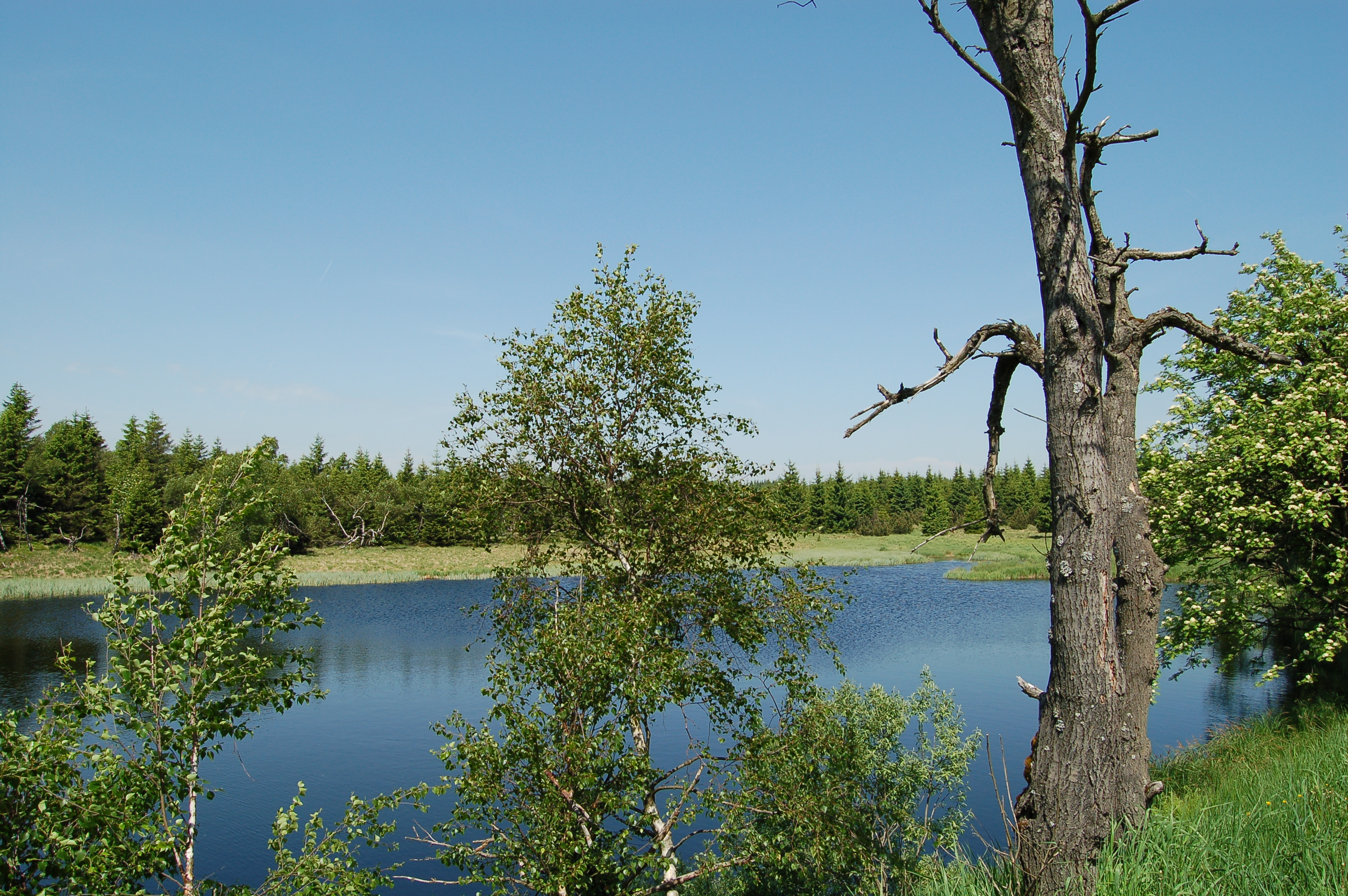 Přírodní rezervace Černý rybník v okrese Most